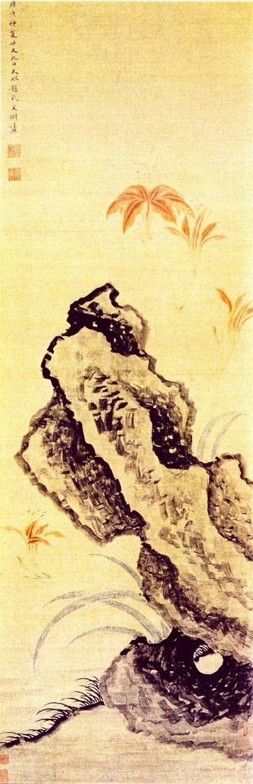 Belle-de-jour et rocher, rouleau mural, encre et couleur sur papier, 1630. Musée du palais impérial Beijing par Wen Shu, peintre chinoise. 1595-1634.